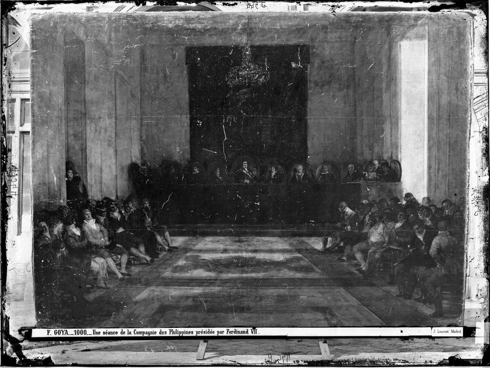 Fotografía de J. Laurent, entre 1868 a 1872, imagen positiva digital a partir del negativo de vidrio original con número de inventario moderno VN-06903, de la Fototeca del Instituto del Patrimonio Cultural de España (IPCE), en Madrid.